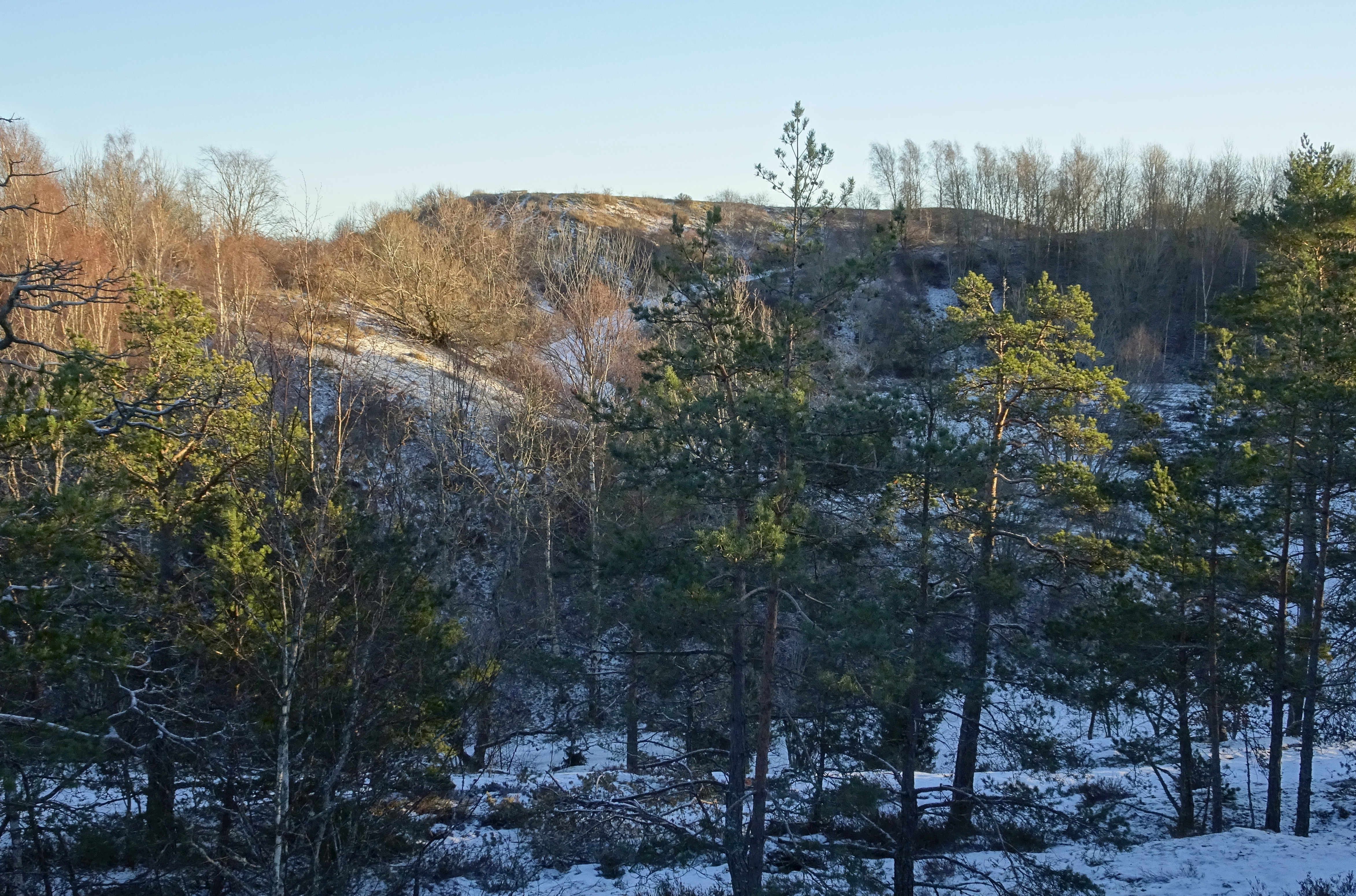 Vårbergstoppen vy från Vikingaberget